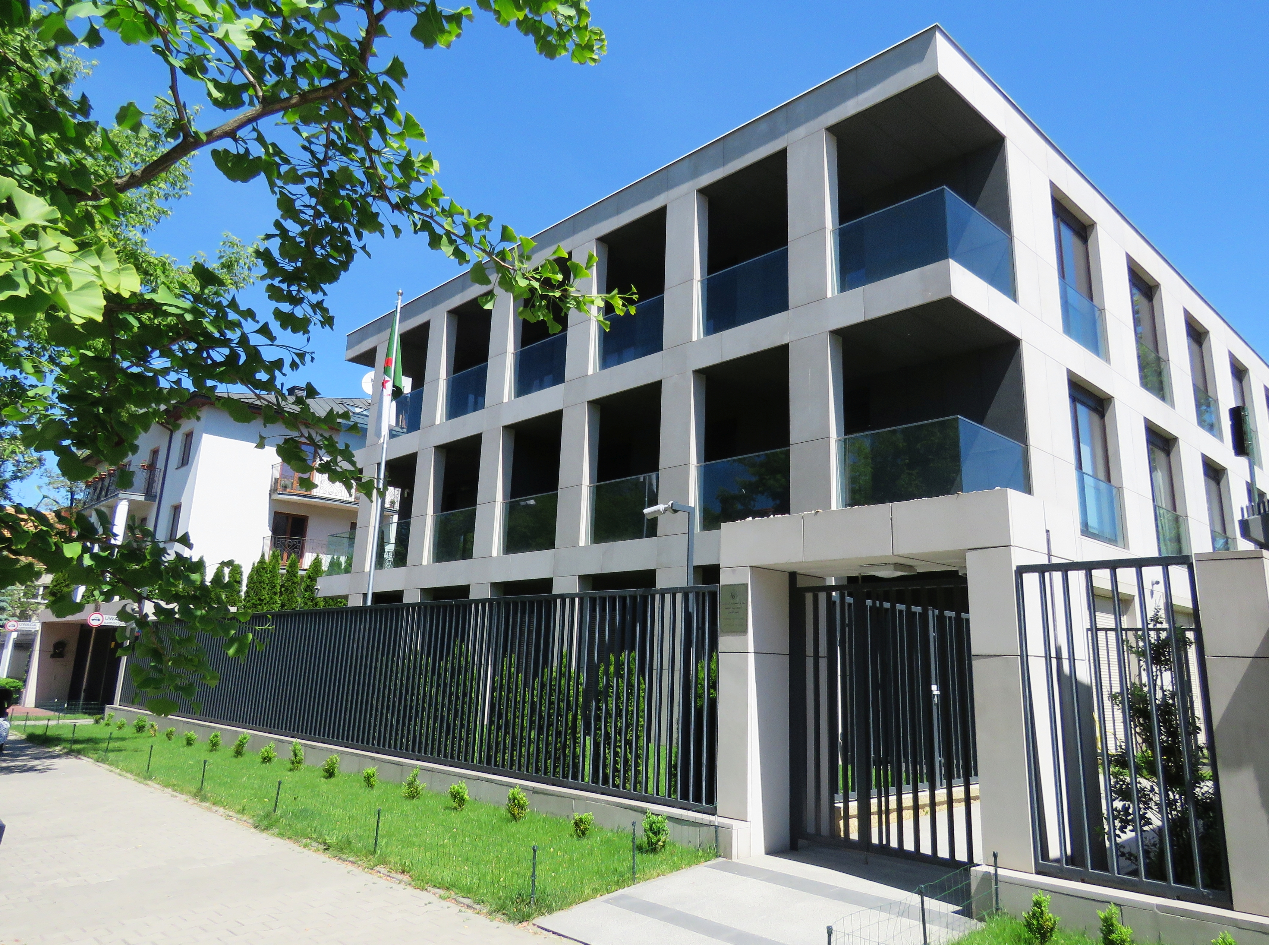 Ambasada Algierii w Polsce, wcześniej ambasada Chorwacji